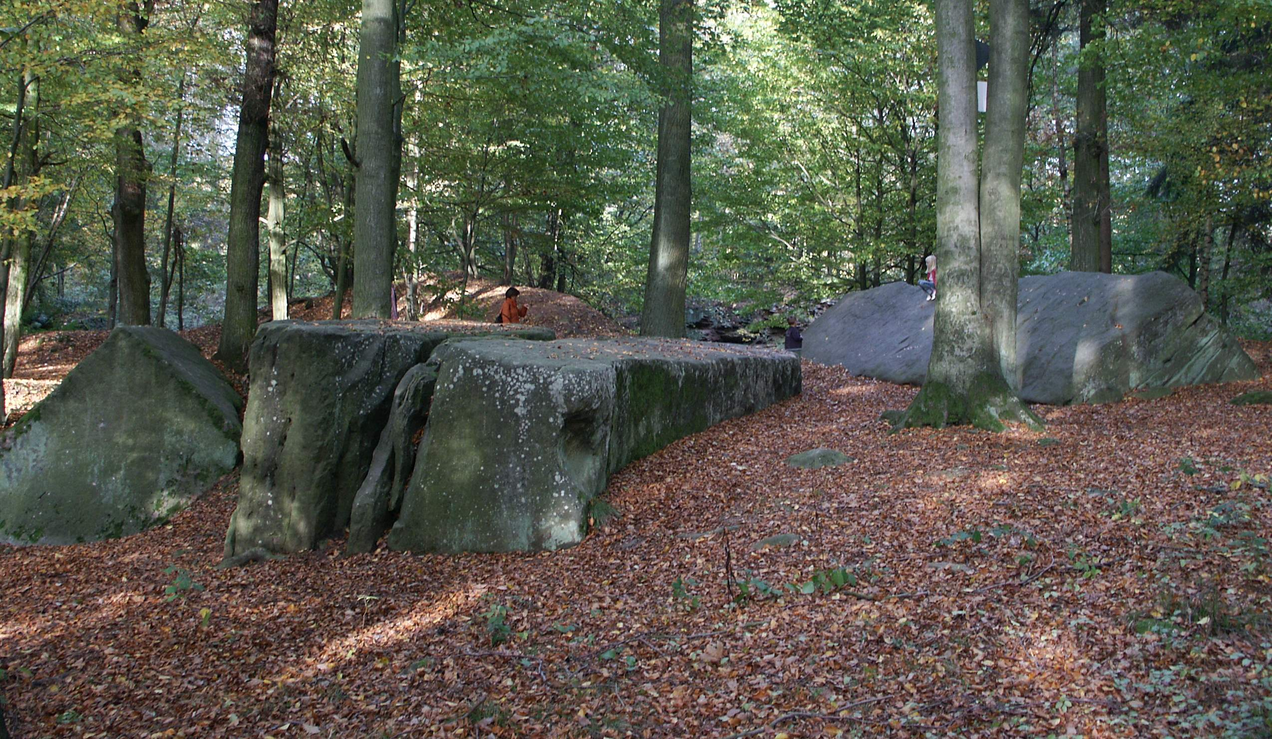 Naturdenkmal „Lange Steine“ in der Gemeinde Haunetal